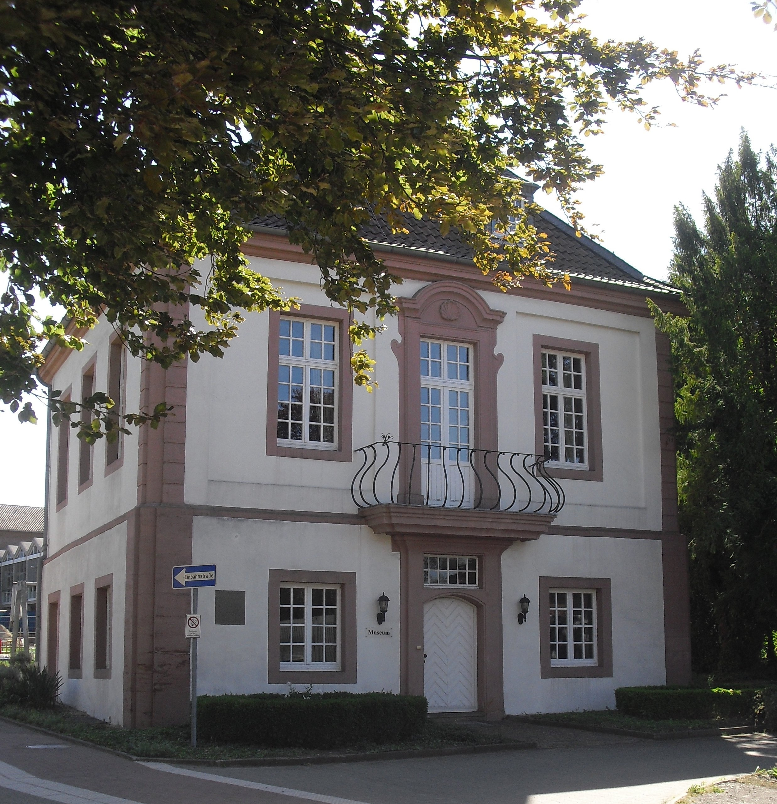 Meyersches Gartenhaus in Paderborn. Gartenhaus des Domkapitulars Ignaz Theodor Liborius Meyer. Am 19. Juli 1824 wurde in diesem Gartenhaus der Verein für Geschichte und Altertumskunde Westfalens, Abt. Paderborn gegründet. Nach dem Tode von Ignatz Meyer 1843 wurde es 1847 an Pauline von Mallinckrodts Blindenschule verkauft. 1945 wude es während eines Luftangriffs zerstört und 1950 wieder aufgebaut. This is a photograph of an architectural monument.